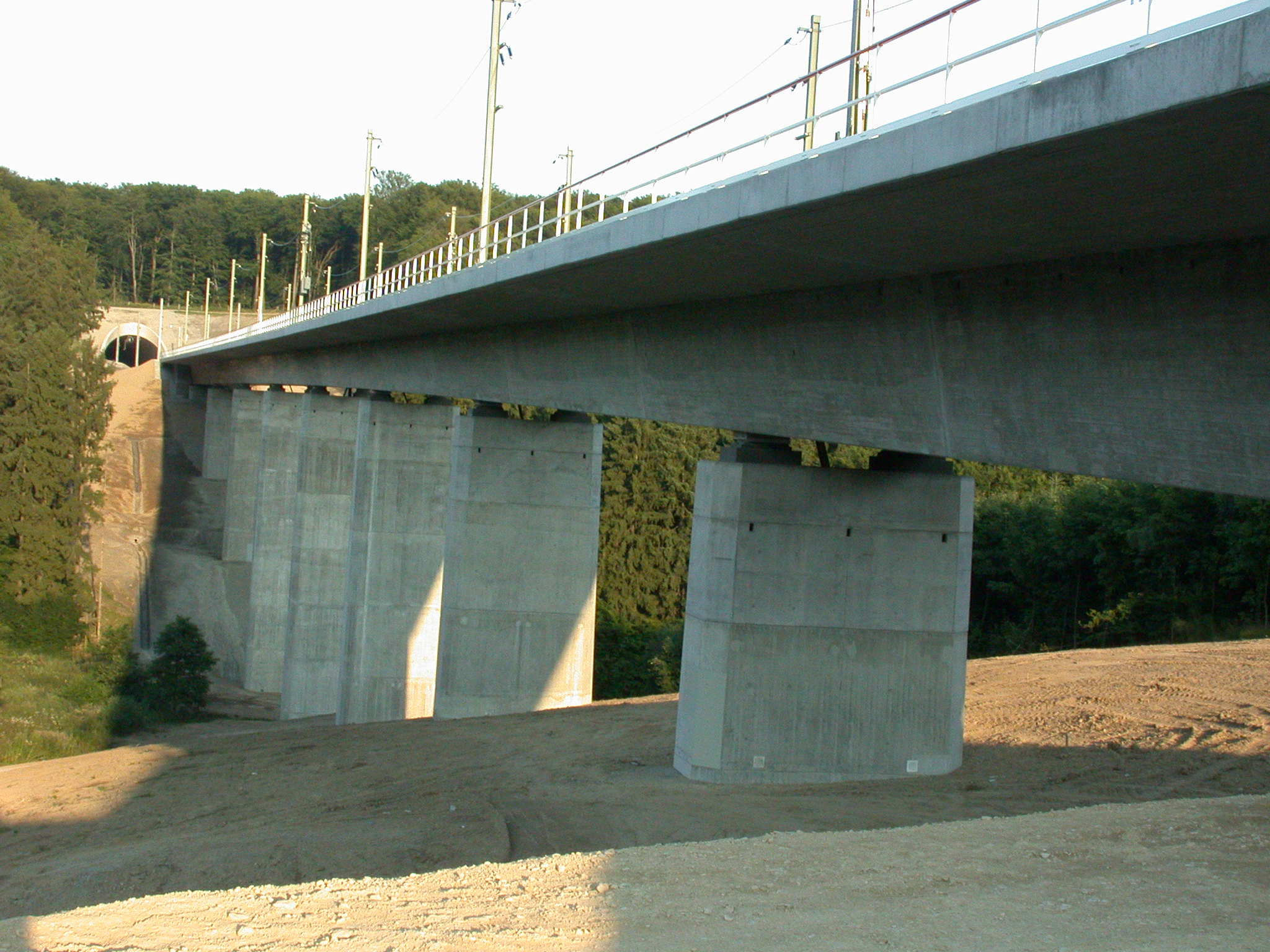 Wiesengrund-Brücke der ICE-Strecke Frankfurt-Köln im Gebiet der Gemeinde Heilberscheid, Deutschland